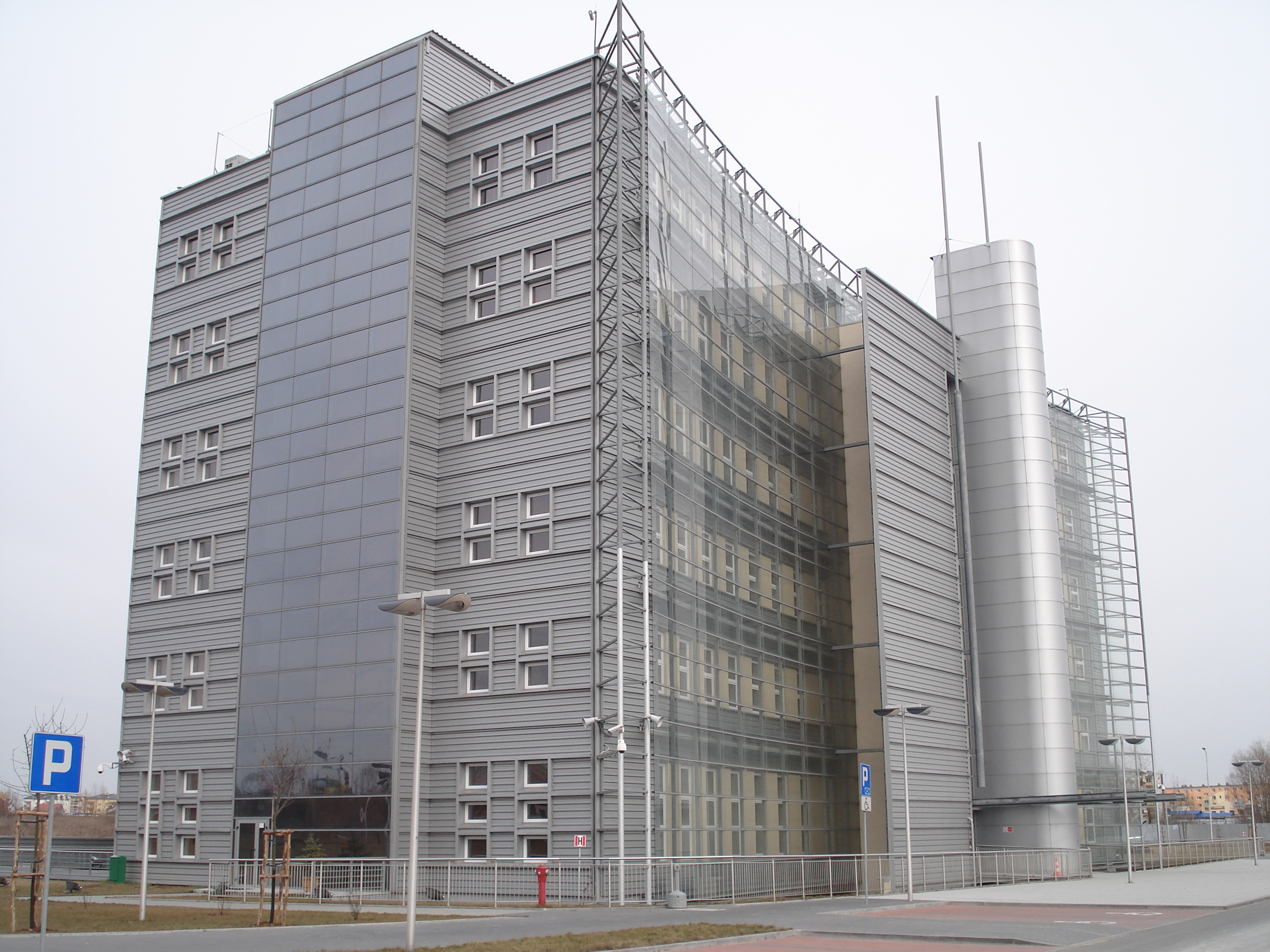 Płock, ul. Wyszogrodzka 133 - siedziba PERNu